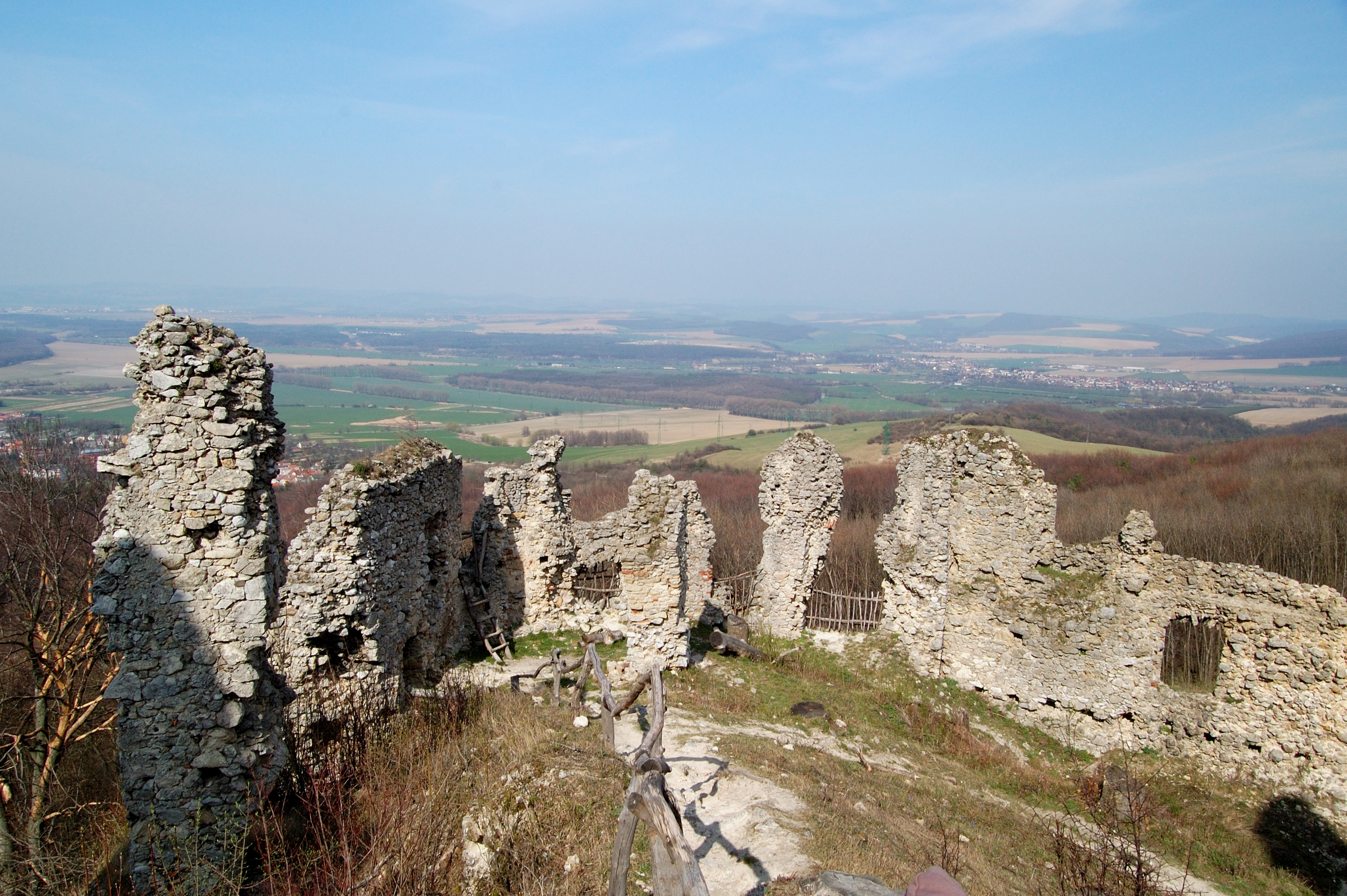 Nádvorie hradné ii.